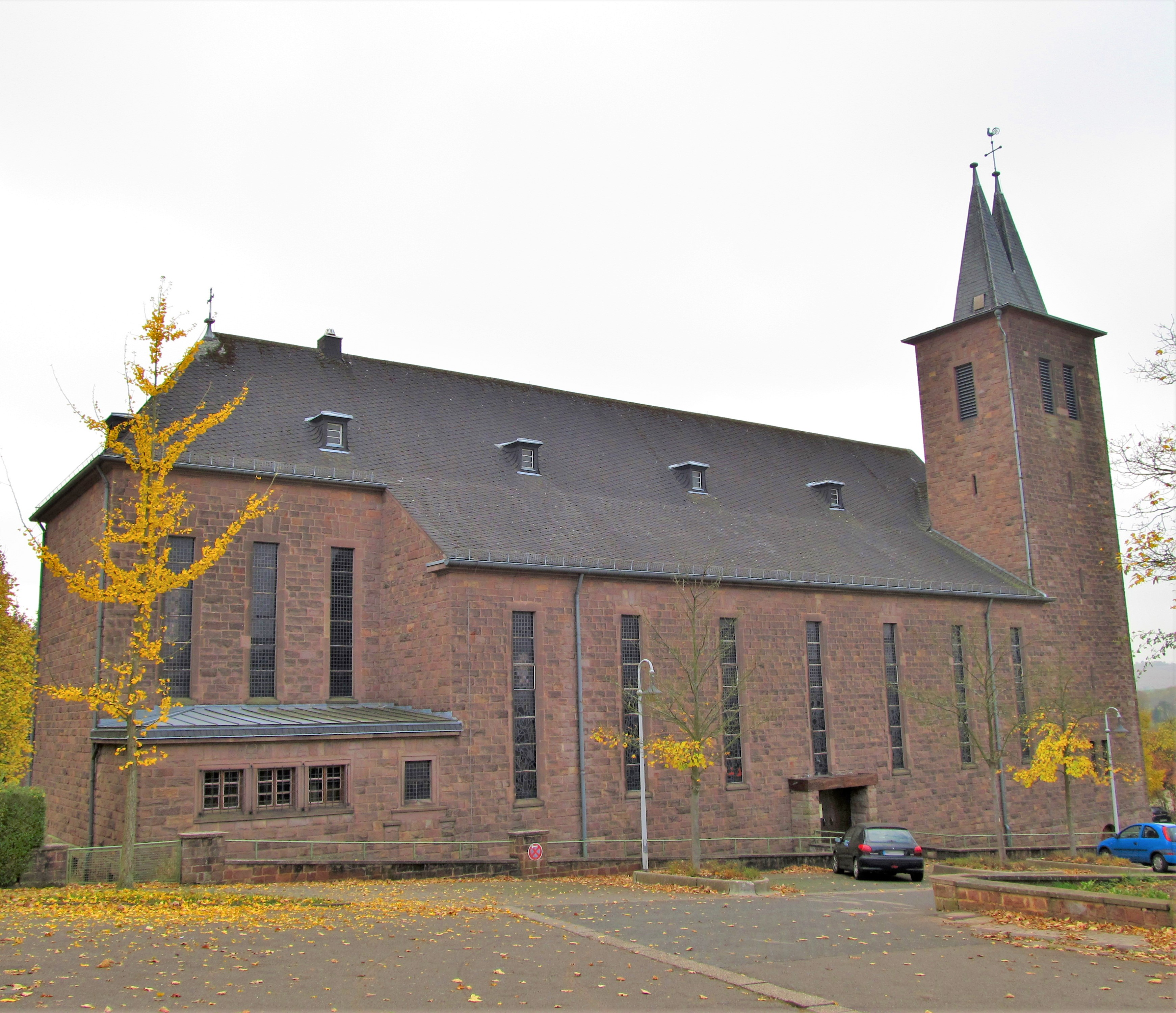 Die katholische Pfarrkirche Herz Jesu in Wustweiler, einem Ortsteil von Illingen, Landkreis Neunkirchen, Saarland